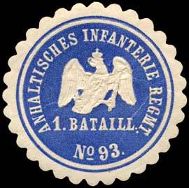 Sealing stamp Title: Anhaltisches Infanterie Regiment No. 93, 1 Bataillon Description: blau, weiß, geprägt Place: Dessau, Zerbst size: 4 cm